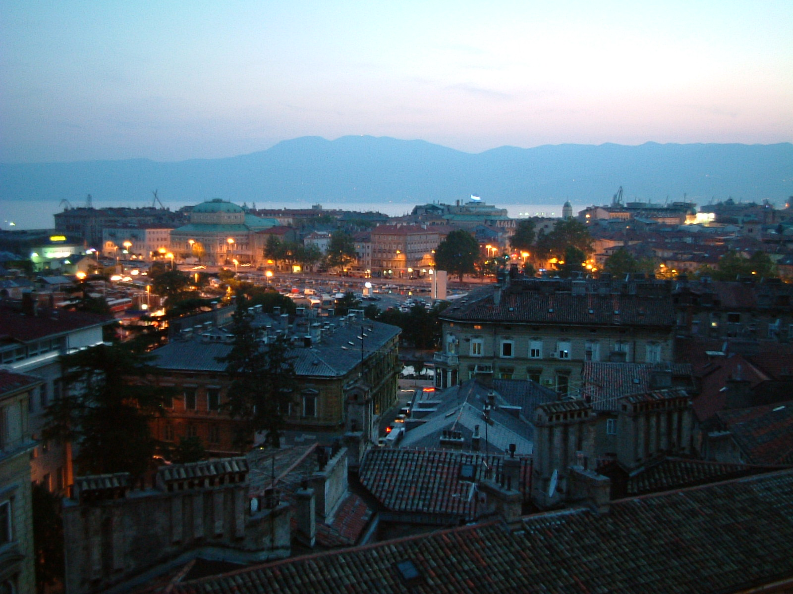 Монгол: Rijeka - Utsikt fra Hotell Neboder